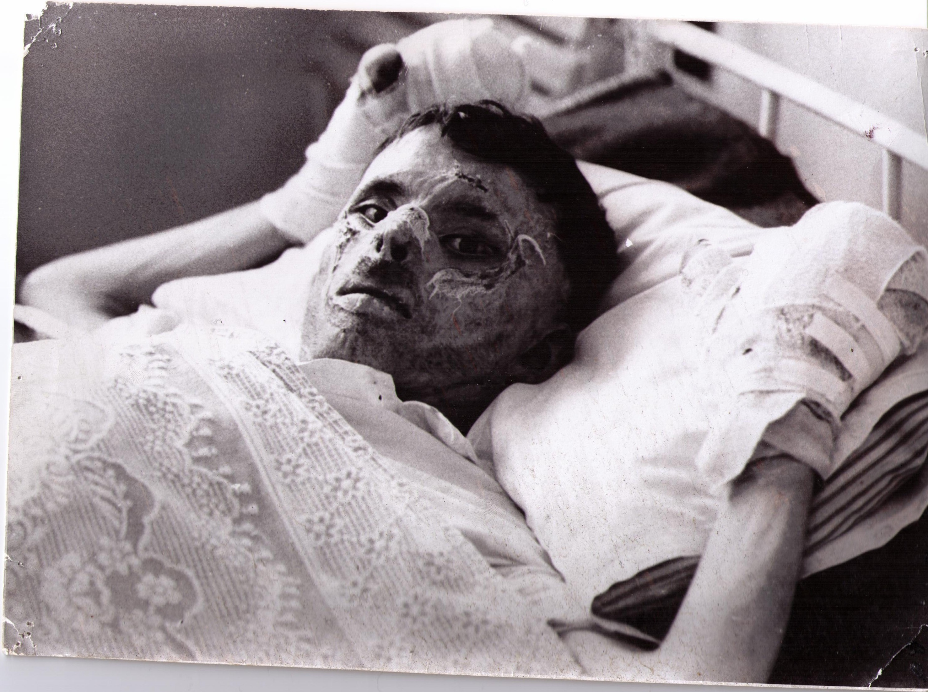 Durant la guerre des Six Jours, entre Israël et les pays arabes, l’État hébreu déversa le feu de cette arme terrible sur l'armée jordanienne.